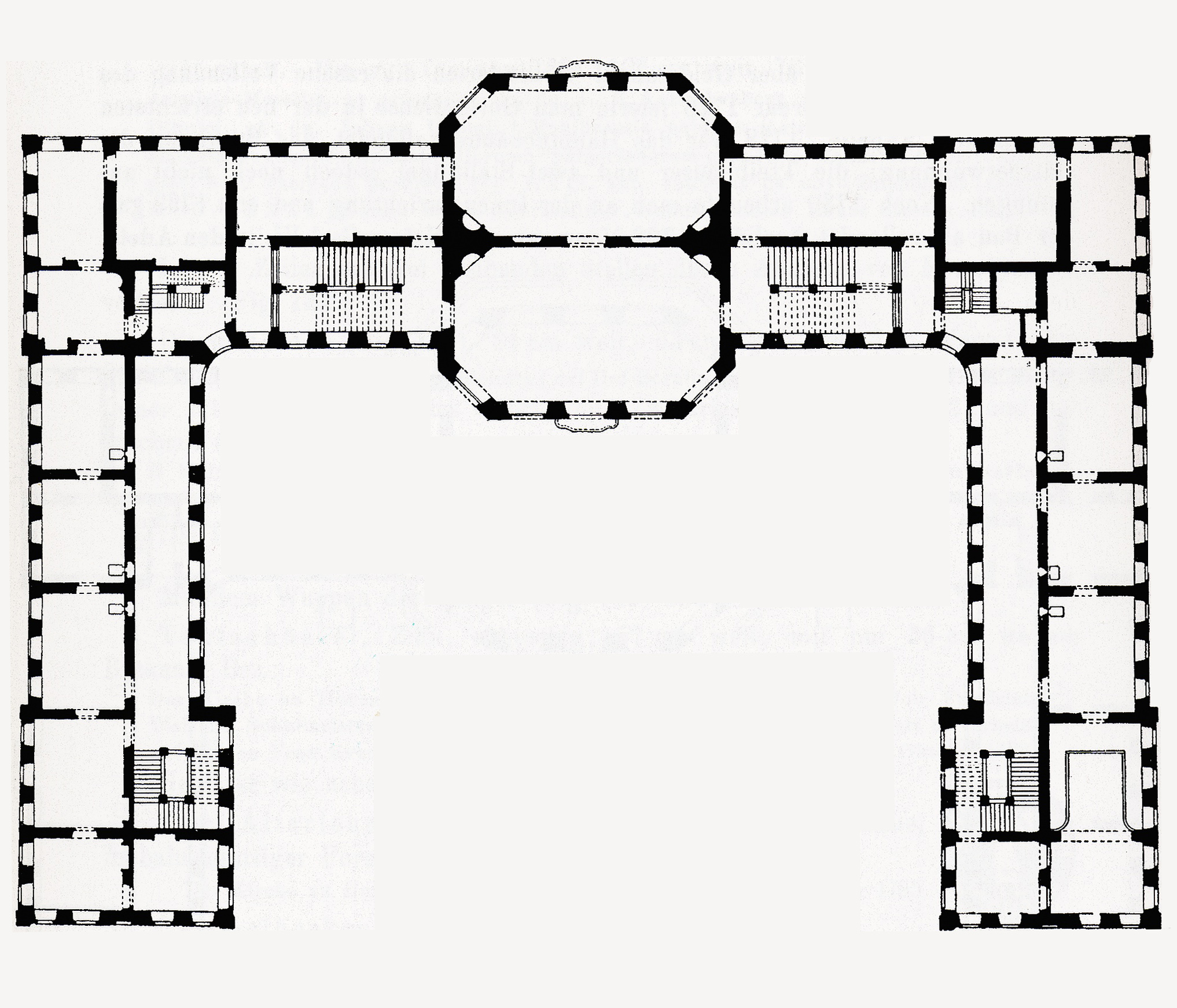 Altes Schloss Hubertusburg